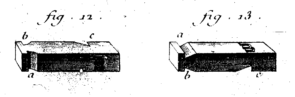 Detalle de la página 147 del volumen 2 de la Encyclopédie.